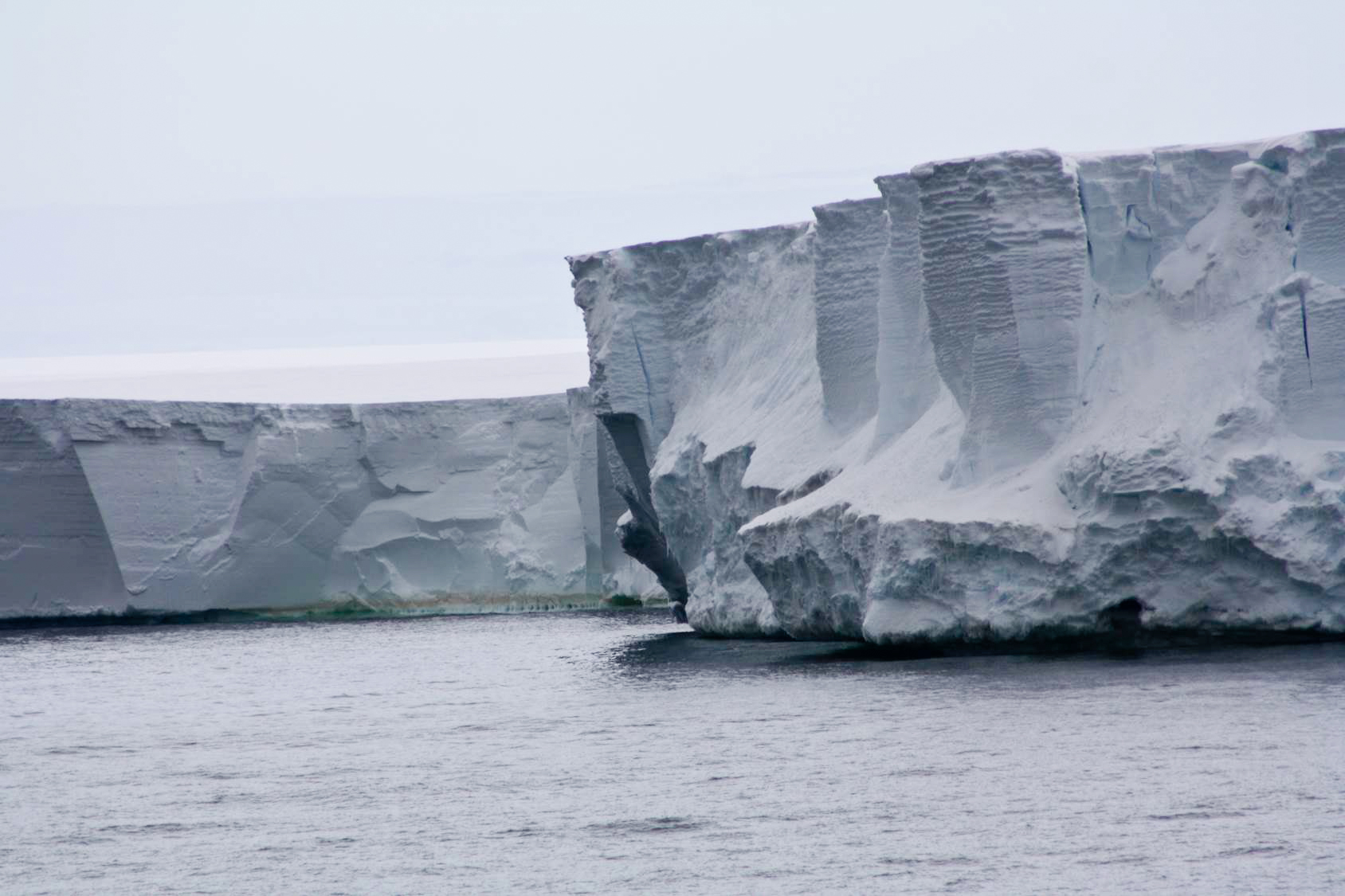 Wer glaubt, dass es in unserer globalisierten Welt keine Abenteuer für Forscher mehr gibt, der kann sich eines Besseren belehren lassen und sich an einer Expedition in die Antarktis beteiligen. Für die Expedition GANOVEX 11 sind im Dezember 2015 drei Forscher des DLR-Instituts für Planetenforschung in Berlin in Richtung Südpol aufgebrochen, um für die internationale Planetenforschung noch unbekannte antarktische Gebiete zu erkunden und gemäß ihrer geologisch-geomorphologischen Besonderheiten mit Strukturen auf dem Mars zu vergleichen. Zur Blogreihe #ExpeditionAntarktis